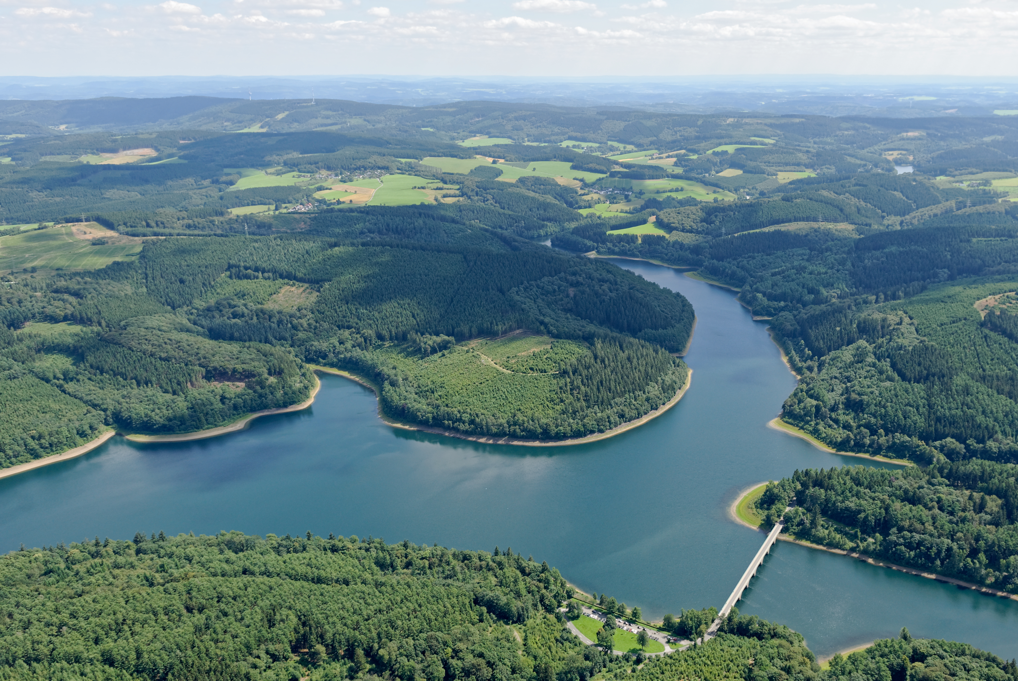 Fotoflug Sauerland West. Versetalsperre mit Brücke der Landesstraße 694. The making of this document was supported by the Community-Budget of Wikimedia Germany.